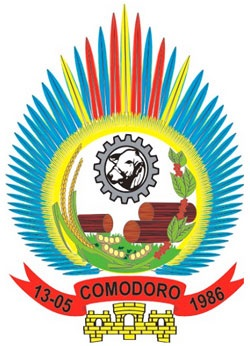 Brasão do município de Comodoro, Mato Grosso, Brasil